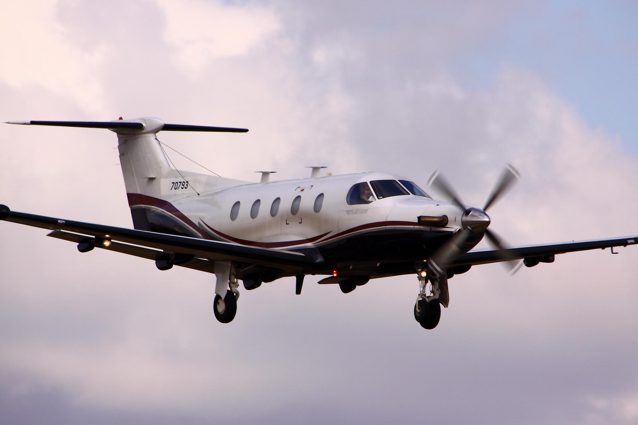 U-28A - RAF Mildenhall